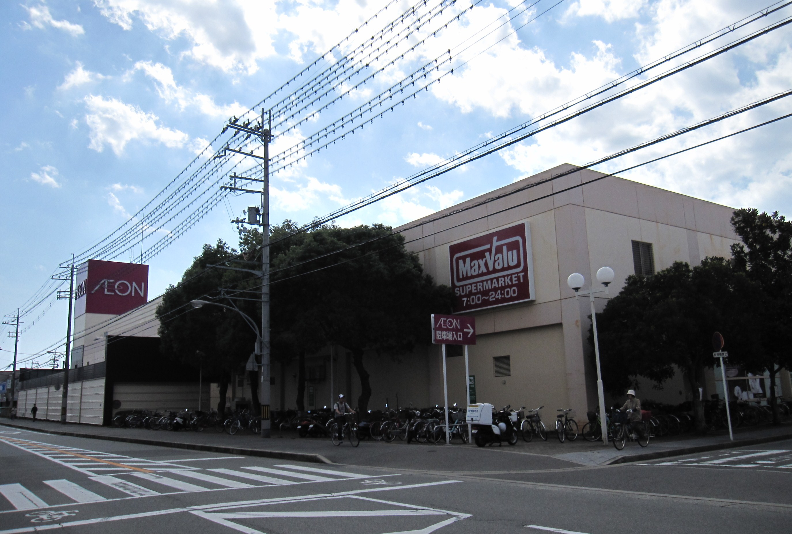 イオンタウン明石